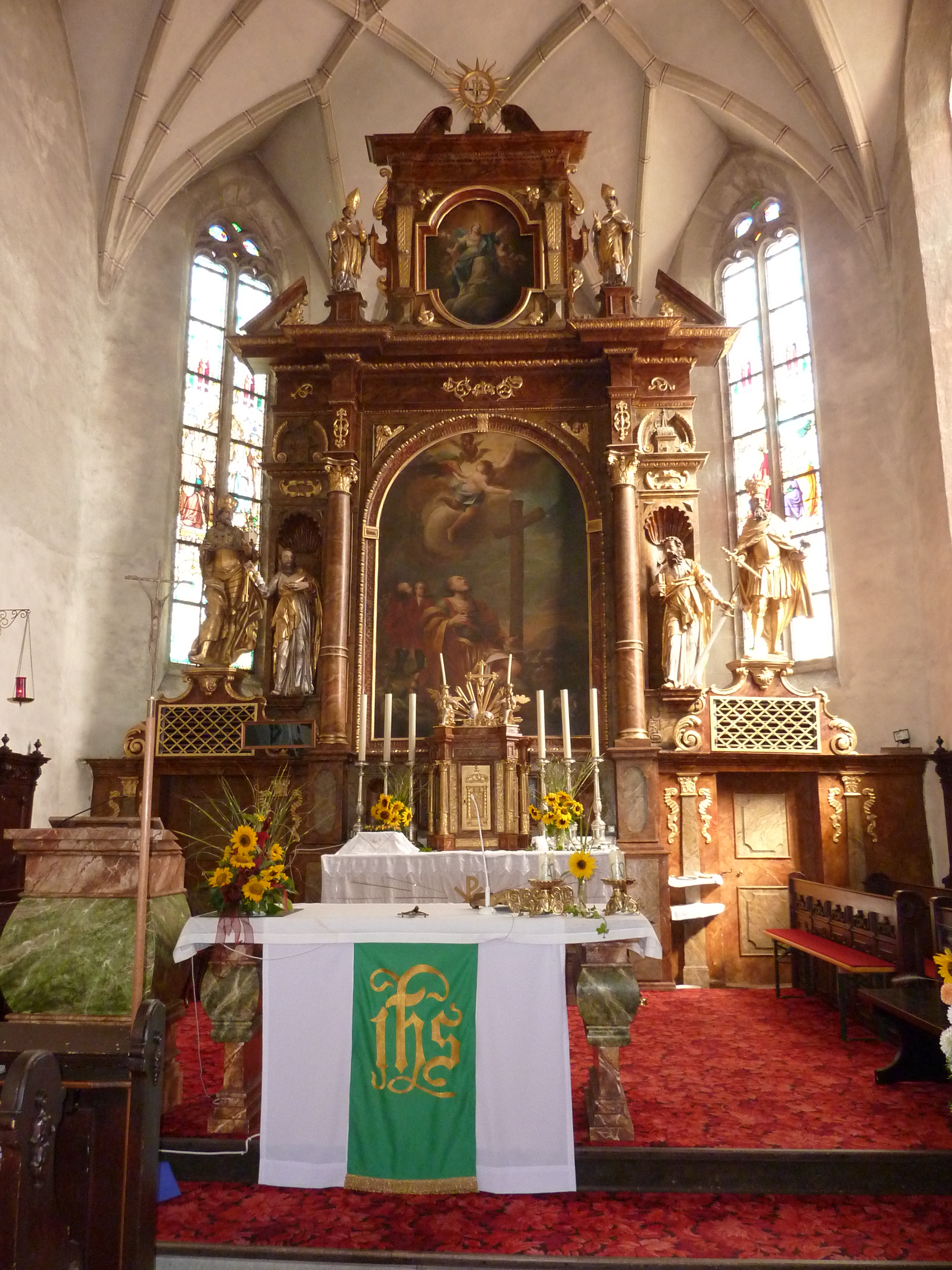 Pfarrkirche St. Oswald, Niederösterreich - Altar